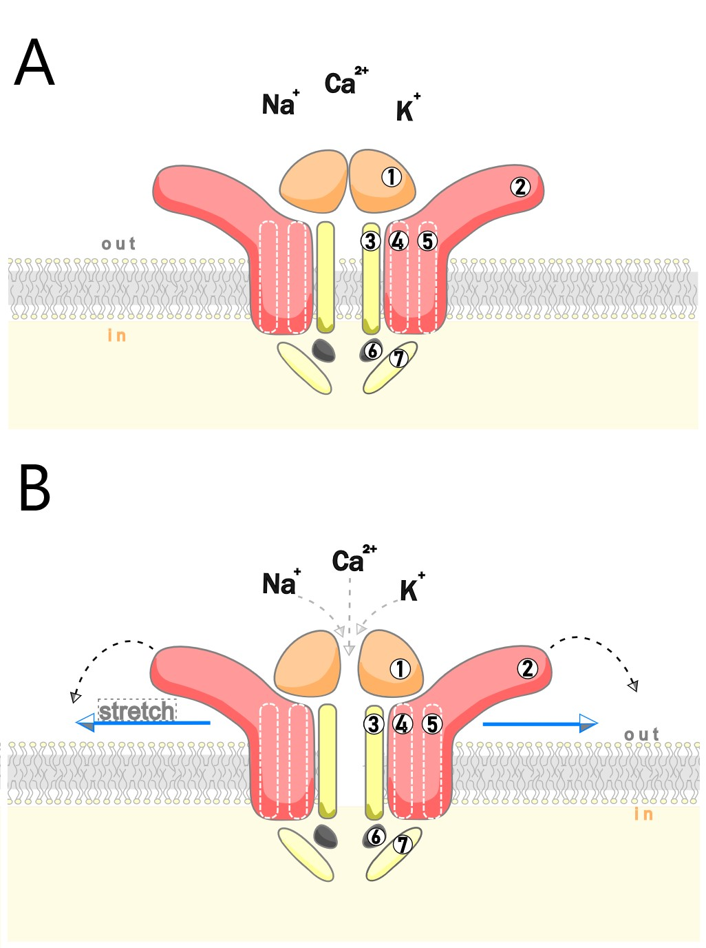 ilustration based on x-ray cristalography work (2017)